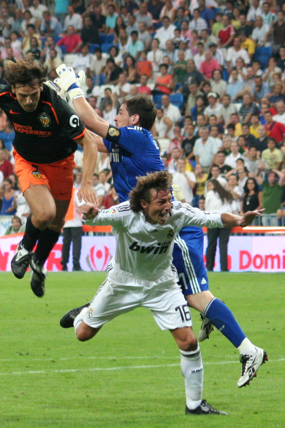 Casillas a por todas